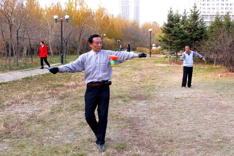 抖空竹